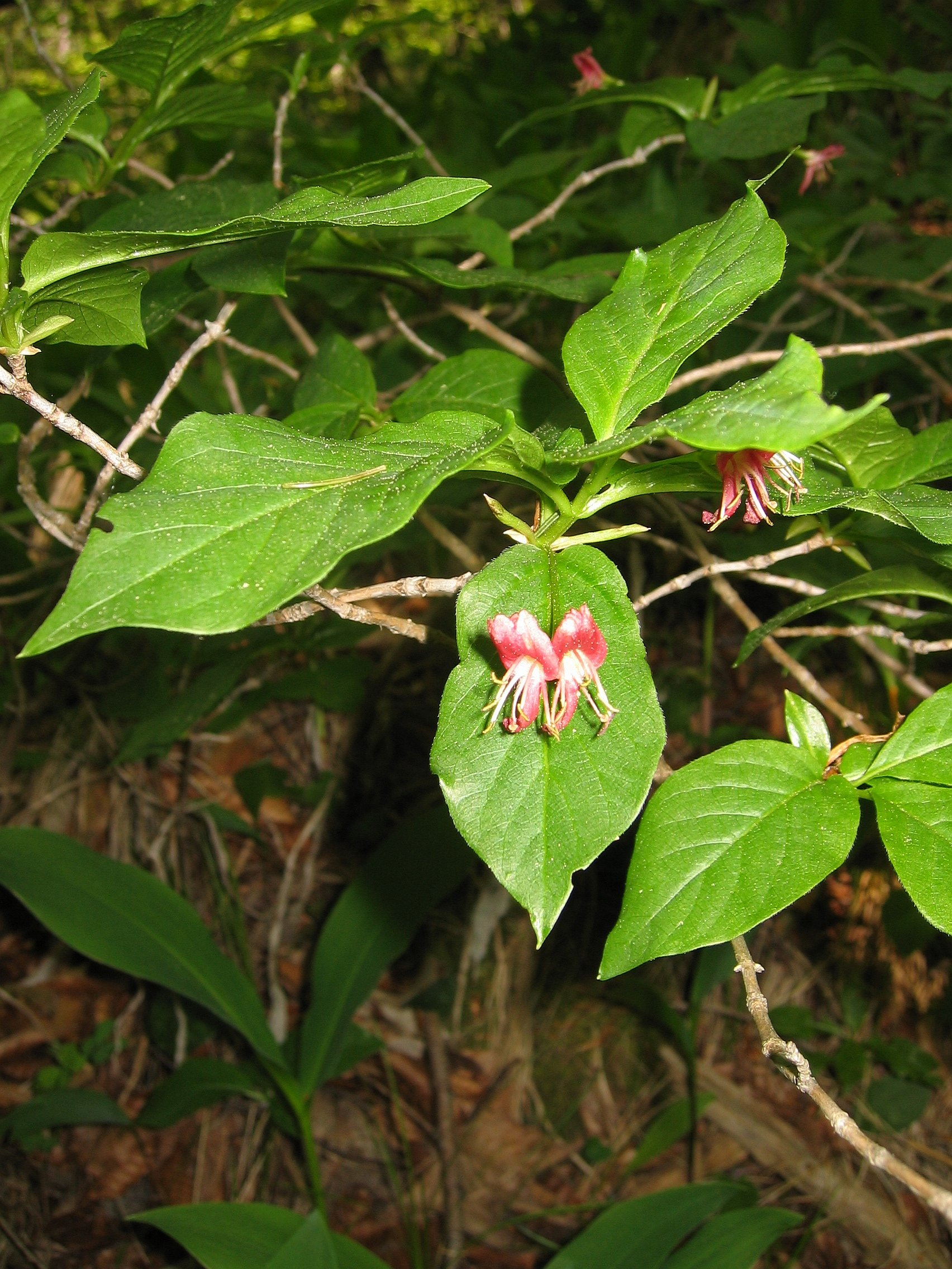 Lonicera alpigena, Near Traunstein ~600 m, Upper Austria, Austria